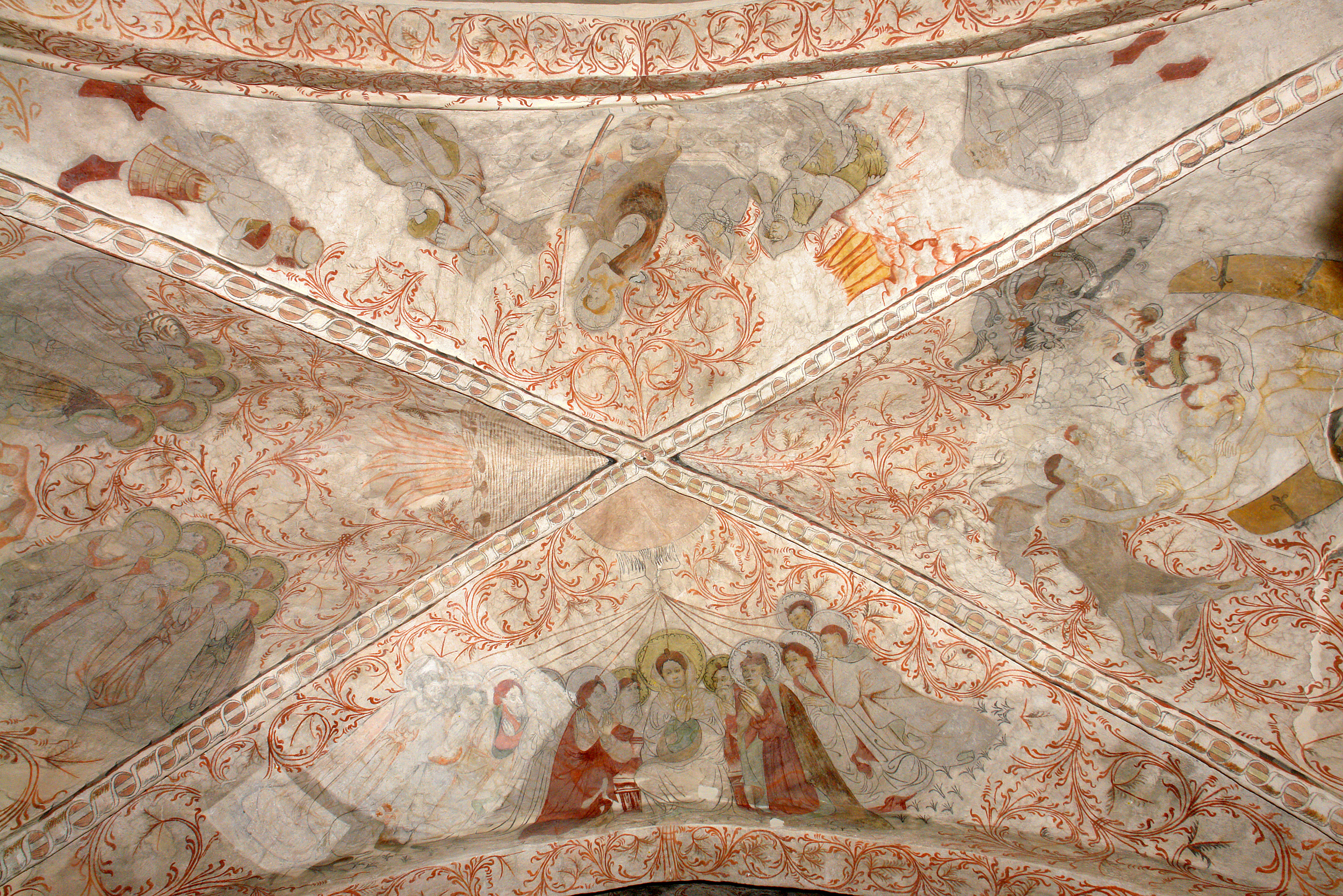 Kirche von Undløse, Dänemark (West-Seeland). Wandmalereien aus der Zeit um 1430–50 vom „Unionsmeister“ oder „Undløse-Meister“ genannten „Meister von Fogdö“. Motive in diesem Bogen (v.l.): Christi Himmelfahrt, Auferstehung, Niederfahrt in das Todesreich, Ausschüttung des Heiligen Geistes.